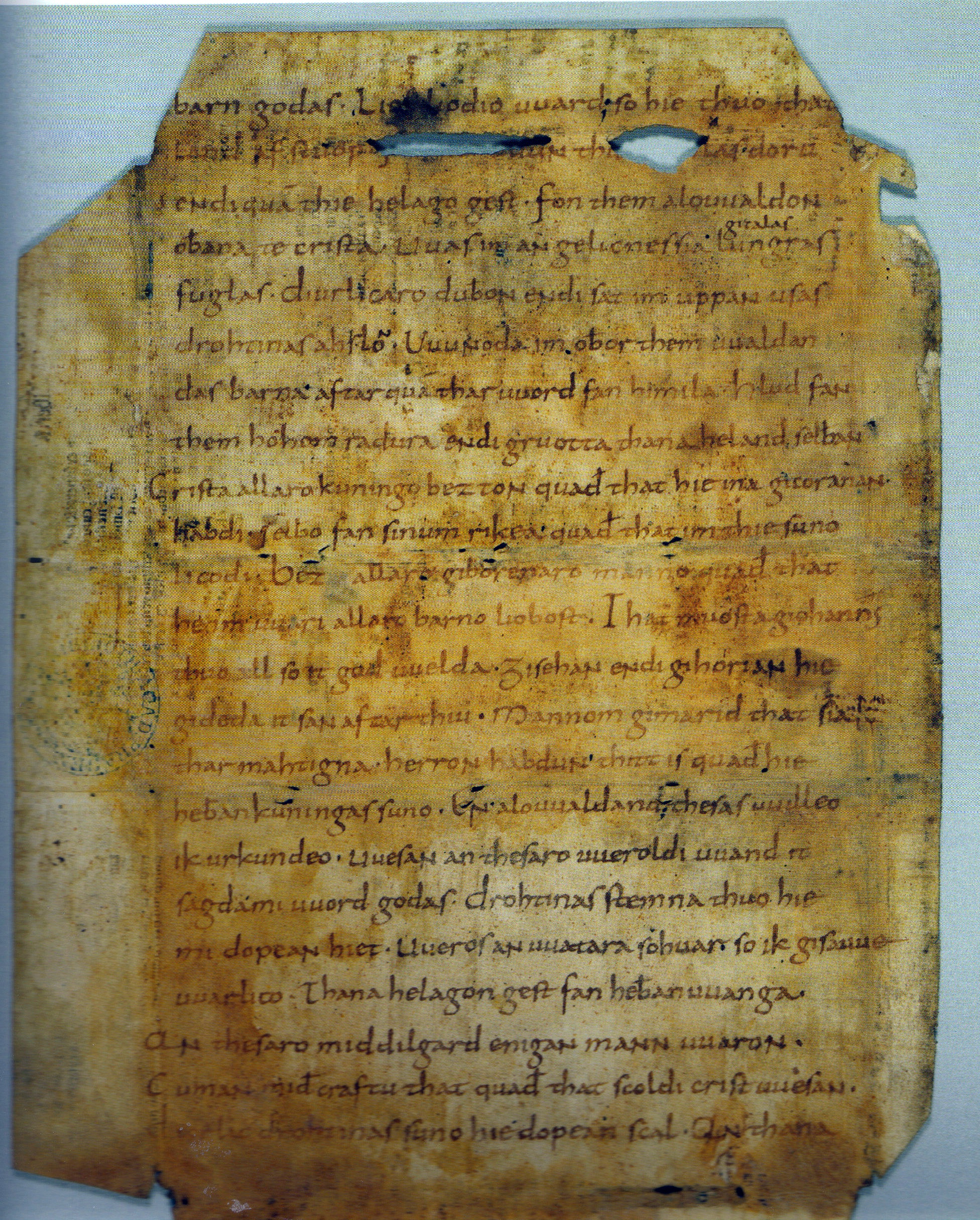 Heliand-Fragment, Berlin DHM R 56/2537